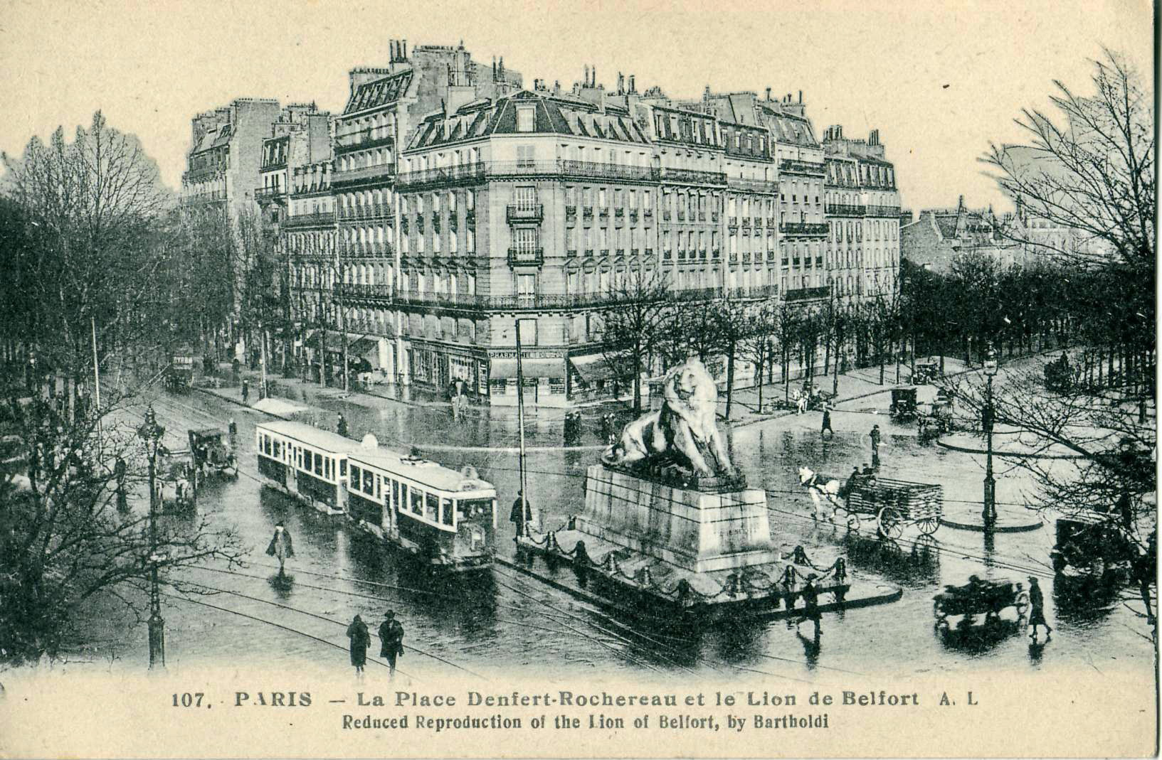 Carte postale ancienne éditée par AL N°107 PARIS - La Place Denfert-Rochereau et le Lion de Belfort Vue d'une ancienne rame de tramway en beau plan